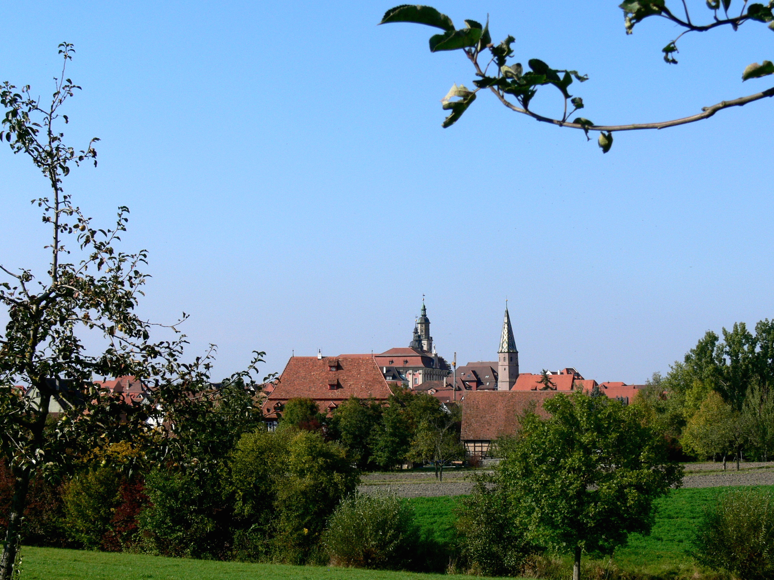 Bad Windsheim. Blick auf die Stadt